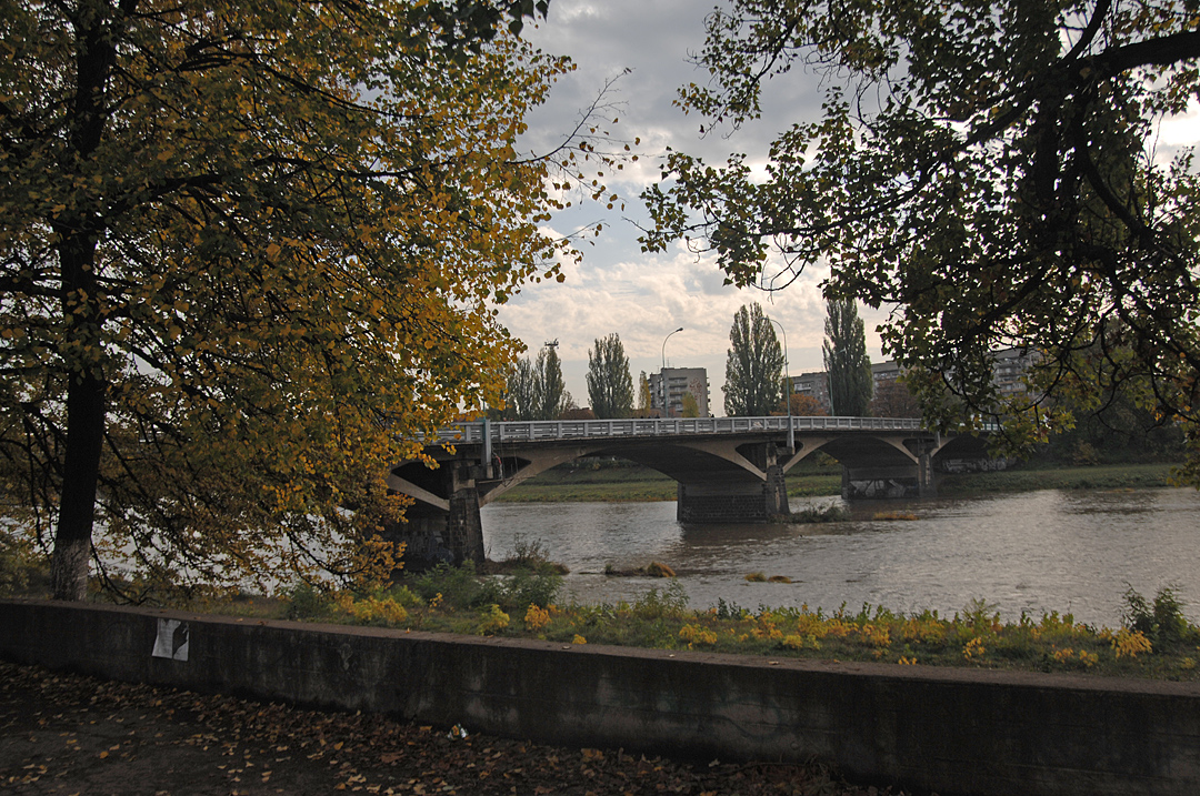 Мост через реку УЖ